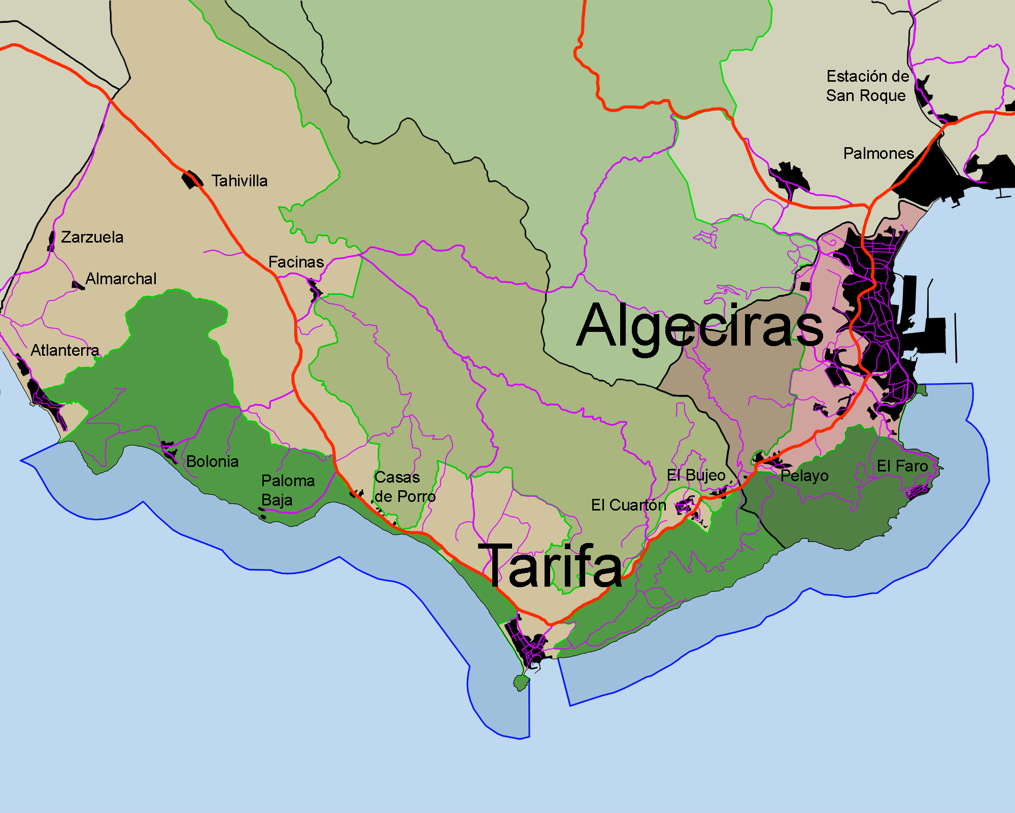 Mapa urbano del Parque natural del Estrecho.